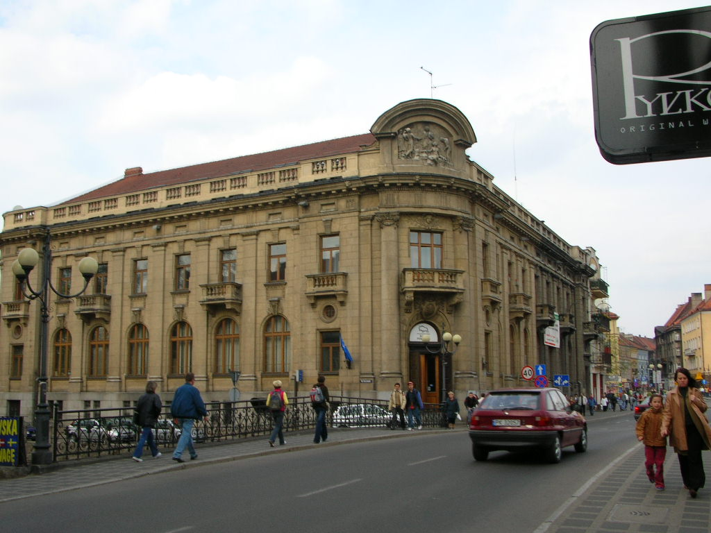 Kalisz, ul. Śródmiejska 29 - bank z 1912 (zabytek nr 755/Wlkp/A) Autor:Bartek Wawraszko (Bast)